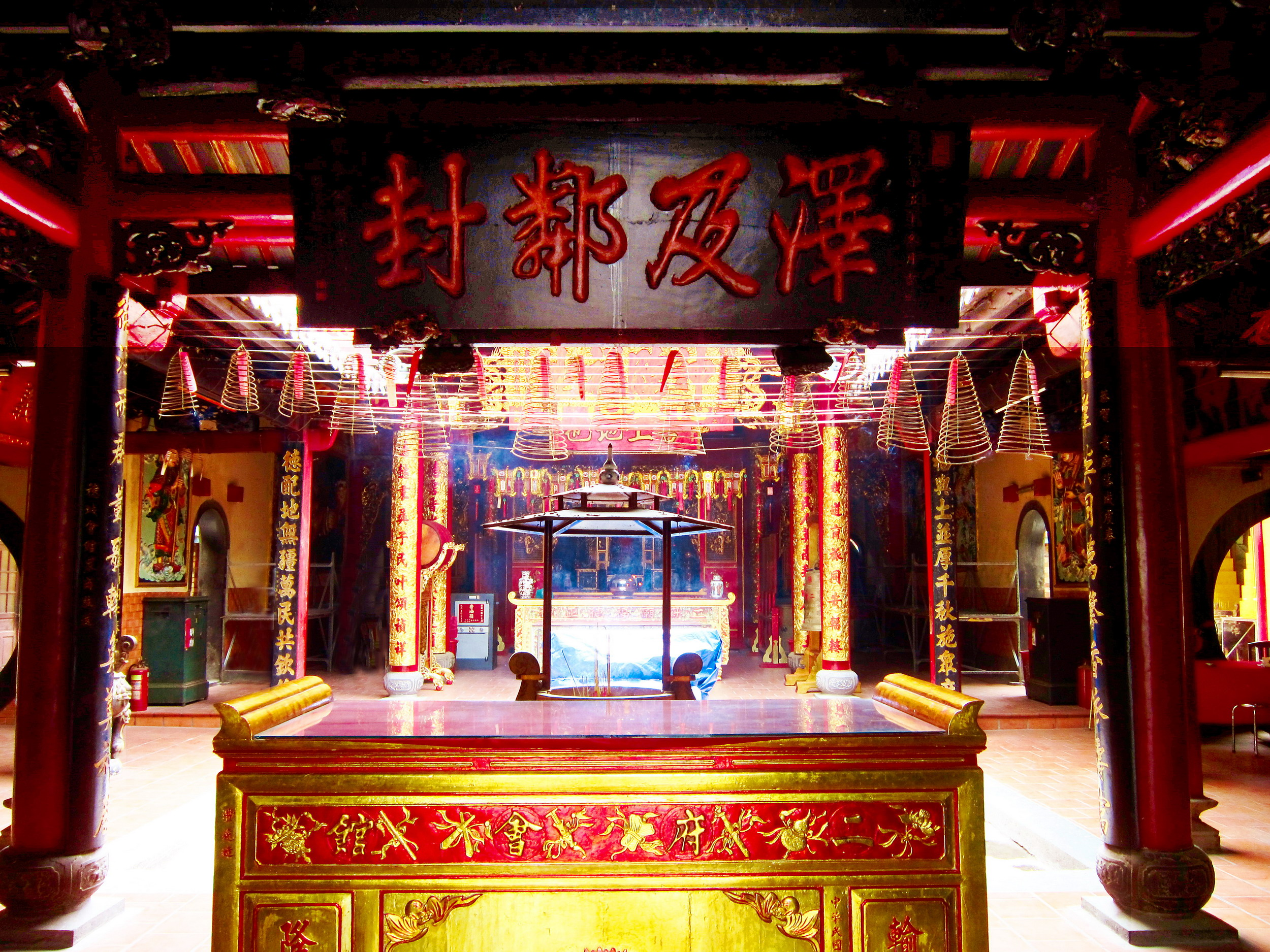 Miếu Nhị Phủ là một ngôi miếu cổ do người Hoa xây dựng vào khoảng đầu thế kỷ 18. Hiện ngôi miếu tọa lạc tại số 264 đường Hải Thượng Lãn Ông, phường 14, quận 5, Thành phố Hồ Chí Minh, Việt Nam.